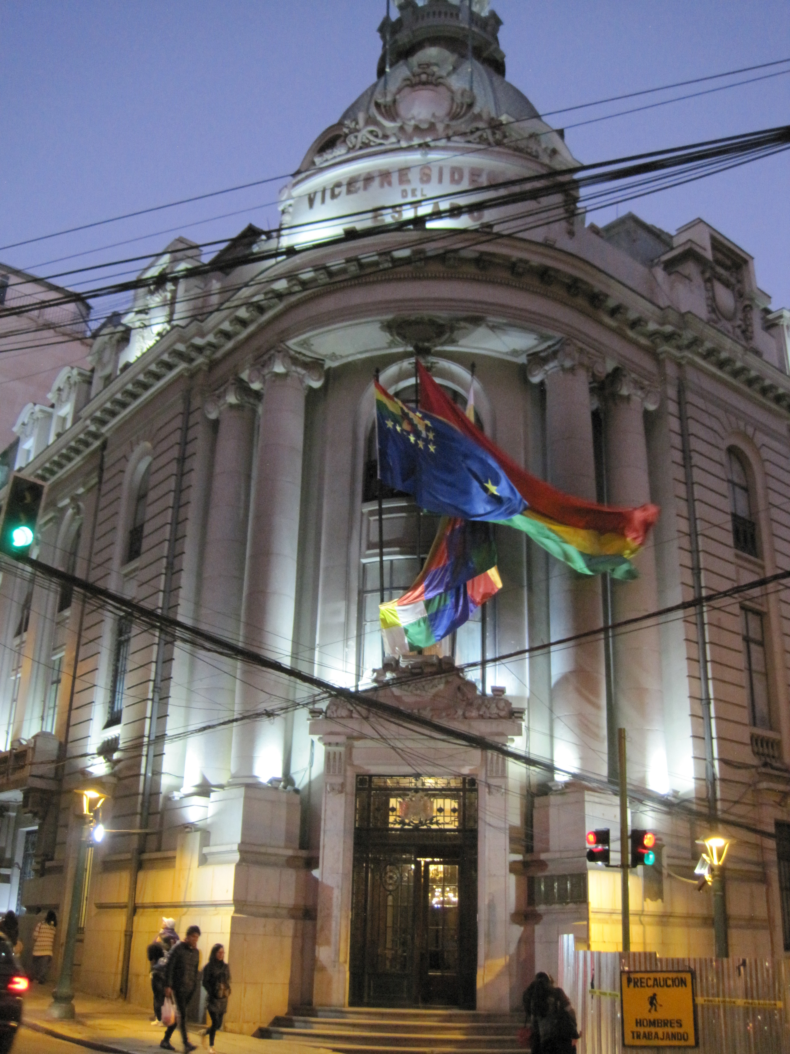 Vicepresidencia del Estado This medium shows the protected monument with the number L/00-095 in Bolivia.